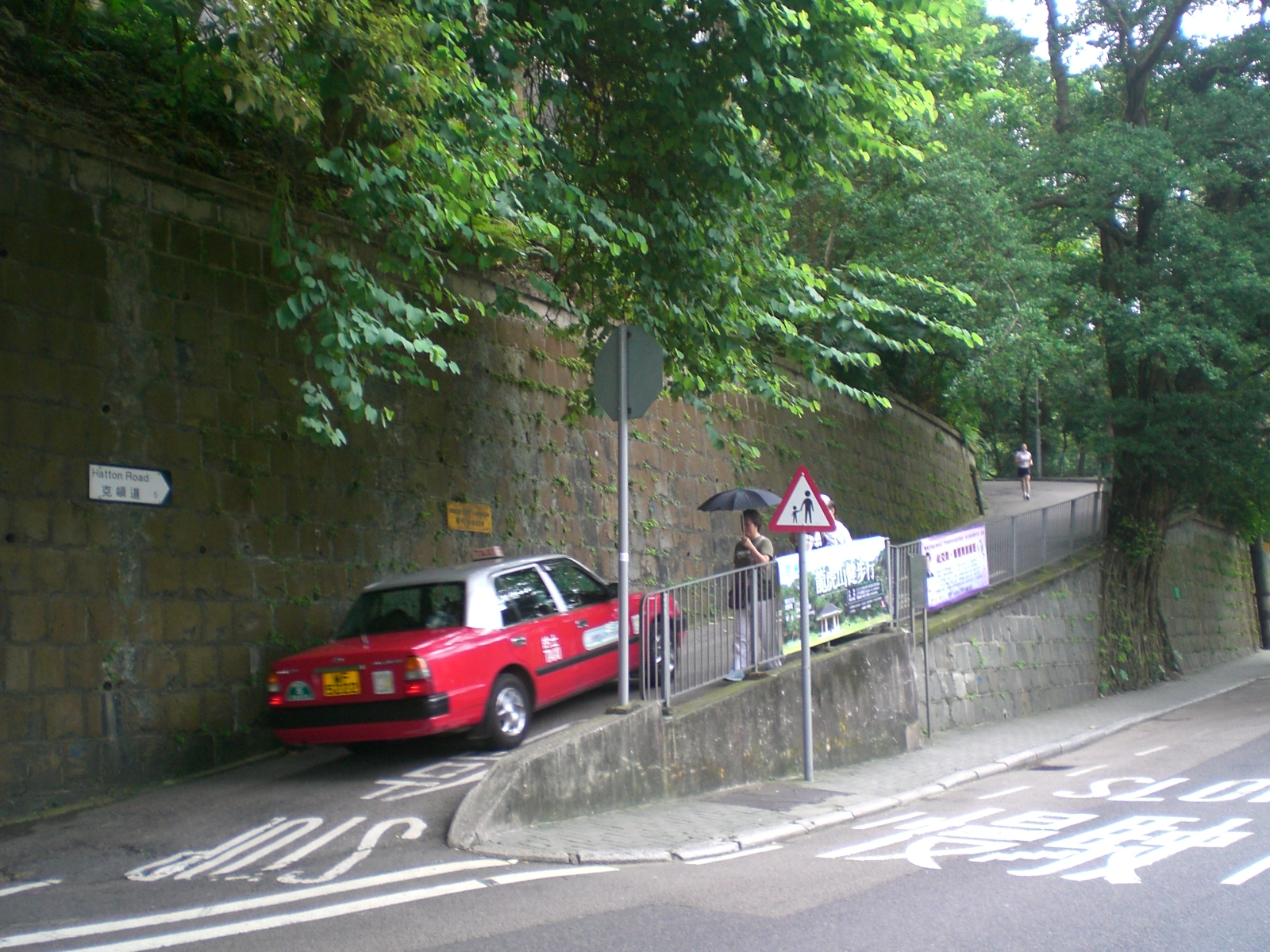 克頓道, Hatton Road, Hong Kong.